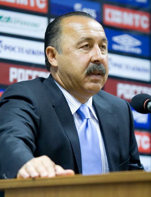 Valeriy Gazzaev